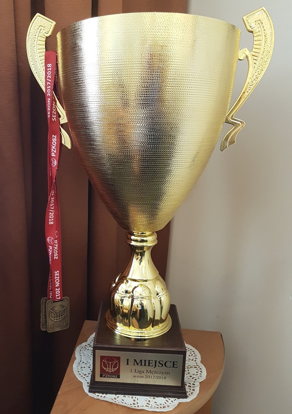 Puchar dla Spójni Stargard za I miejsce w I lidze